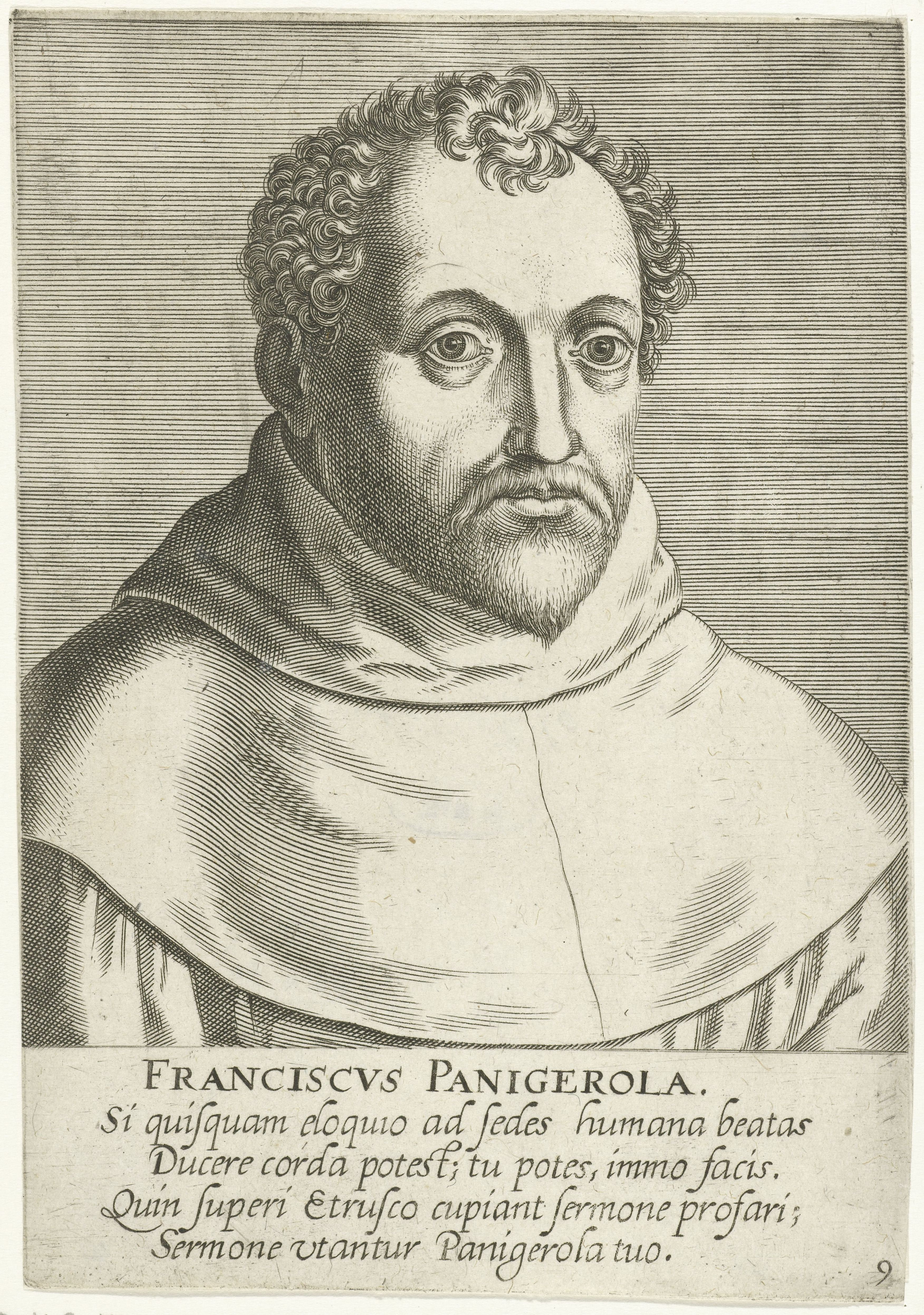 IdentificatieTitel(s): Portret van Francesco PanigarolaFranciscvs Panigerola (titel op object)Portretten van beroemde geleerden (serietitel)Imagines L. Doctorum Virorum (serietitel)Objecttype: prent Serienummer: 9/50Objectnummer: RP-P-1912-7311Catalogusreferentie: New Hollstein Dutch 661Opschriften / Merken: verzamelaarsmerk, verso midden onder, gestempeld: Lugt 2228Omschrijving: Portret van Francesco Panigarola, jurist en bisschop van Asti. Buste naar rechts. De prent heeft een Latijns onderschrift en maakt deel uit van een serie van beroemde geleerden.VervaardigingVervaardiger: prentmaker: Philips Galleschrijver: Franciscus Raphelengius (I)uitgever: Philips Galle (mogelijk)uitgever: Theodoor Galle (mogelijk)Plaats vervaardiging: AntwerpenDatering: 1587 - 1606Fysieke kenmerken: gravureMateriaal: papier Techniek: graveren (drukprocedé)Afmetingen: blad: h 168 mm × b 118 mmOnderwerpWie: Francesco PanigarolaVerwerving en rechtenVerwerving: onbekendCopyright: Publiek domein